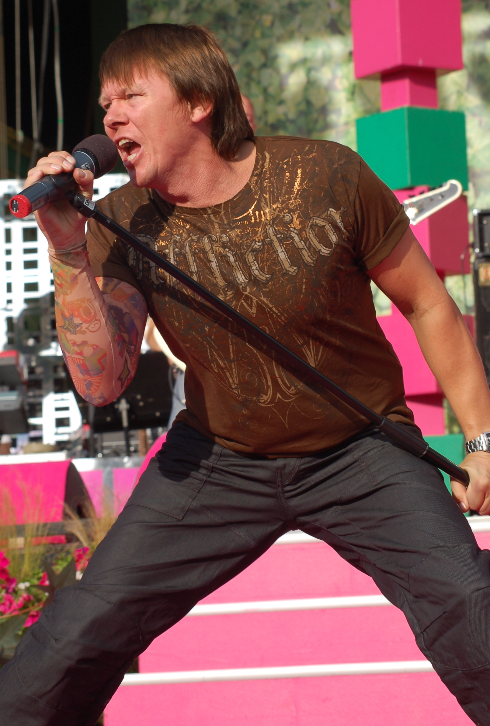 Sha-Boom på Sommarkrysset, Gröna lund 2008.